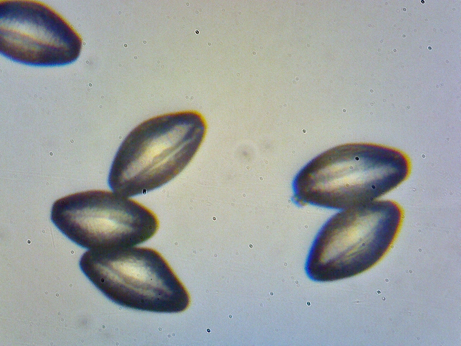 Пыльца сенполии (Saintpaulia) под микроскопом